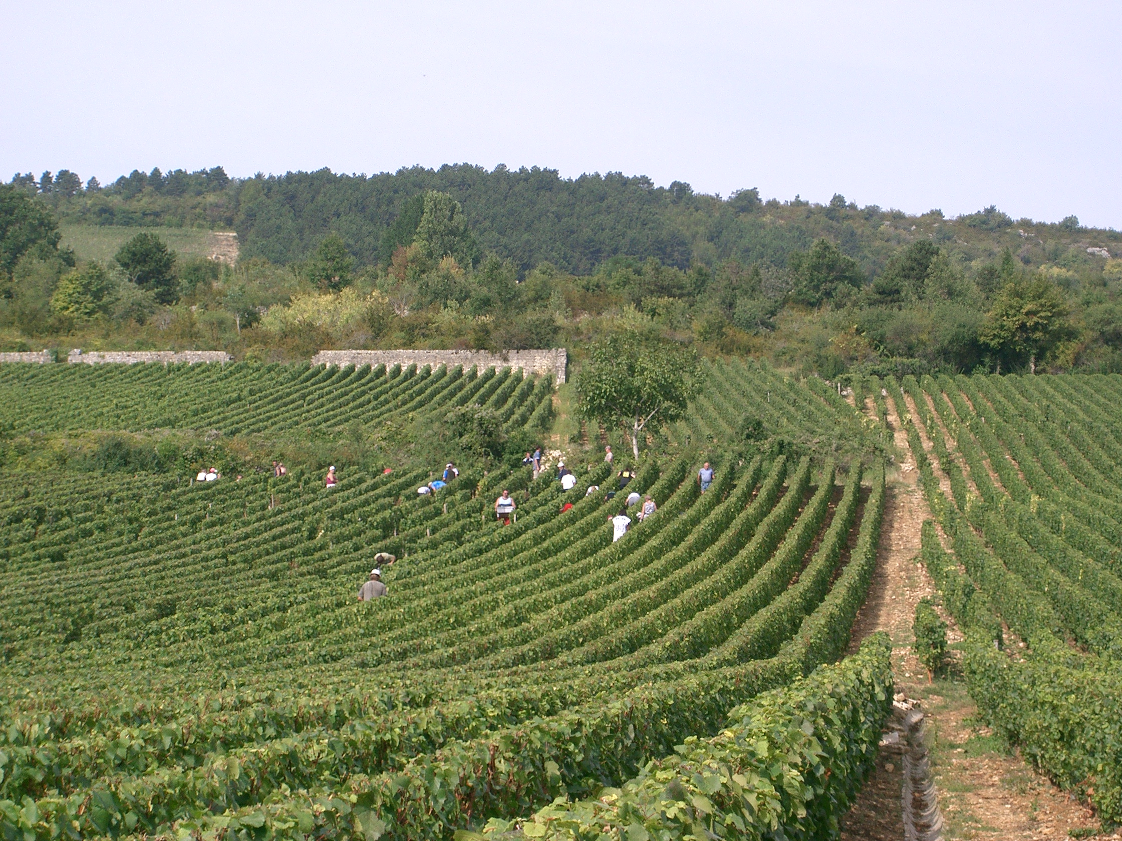 vendanges à Meursault (Bourgogne)